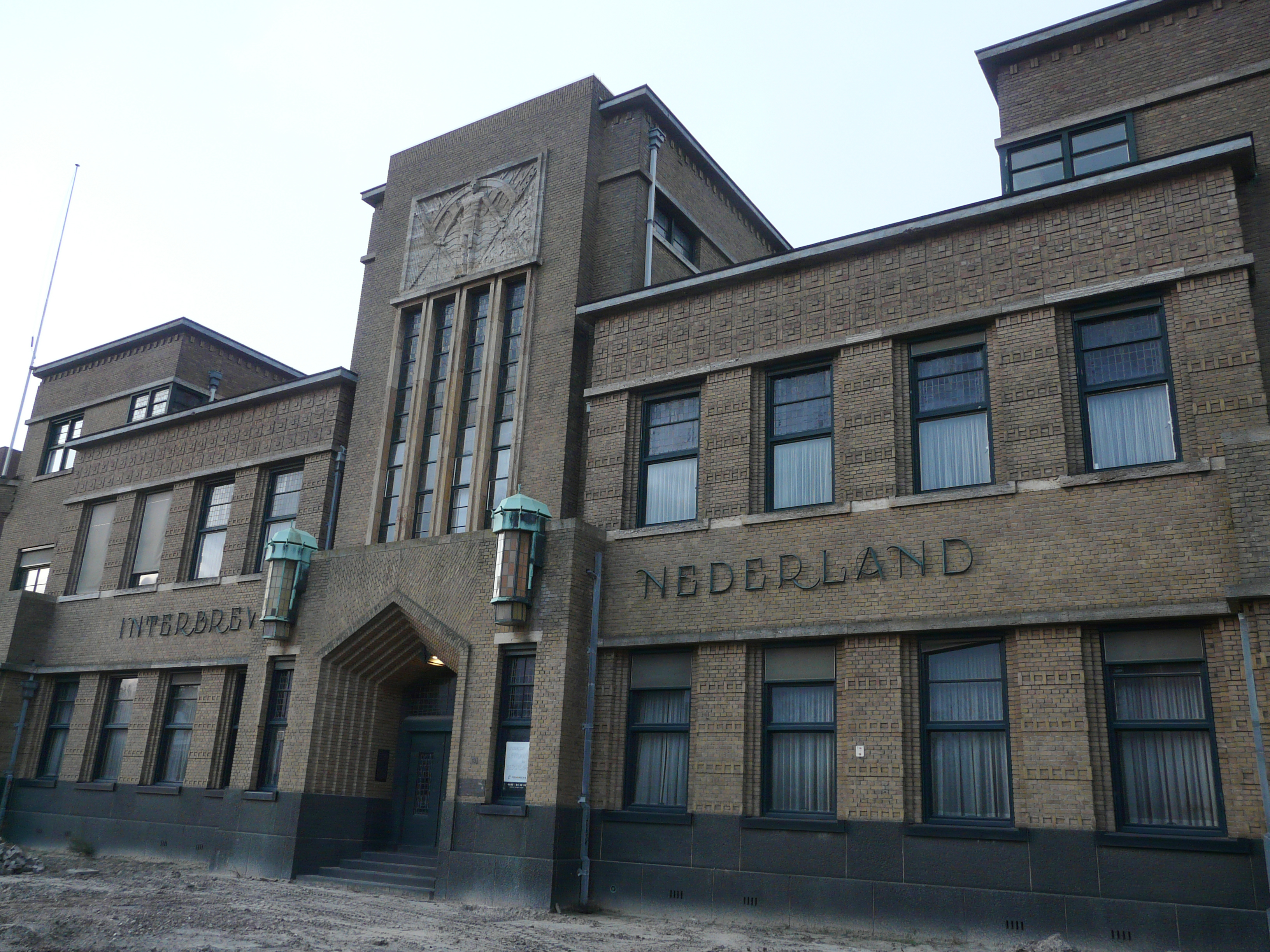 Voormalig kantoorpand Bierbrouwerij Interbrew in de Ceresstraat in Breda Centrum in Breda